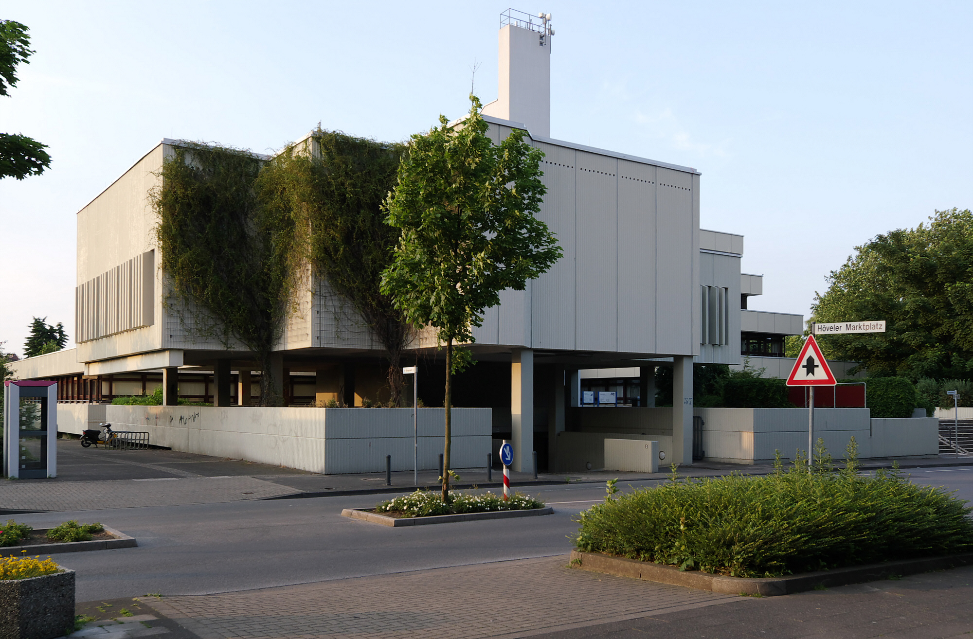 Hamm,ehemaliges Rathaus der Stadt Bockum-Hövel, heute Verwaltungszweigstelle der Stadtverwaltung Hamm (Bürgeramt)